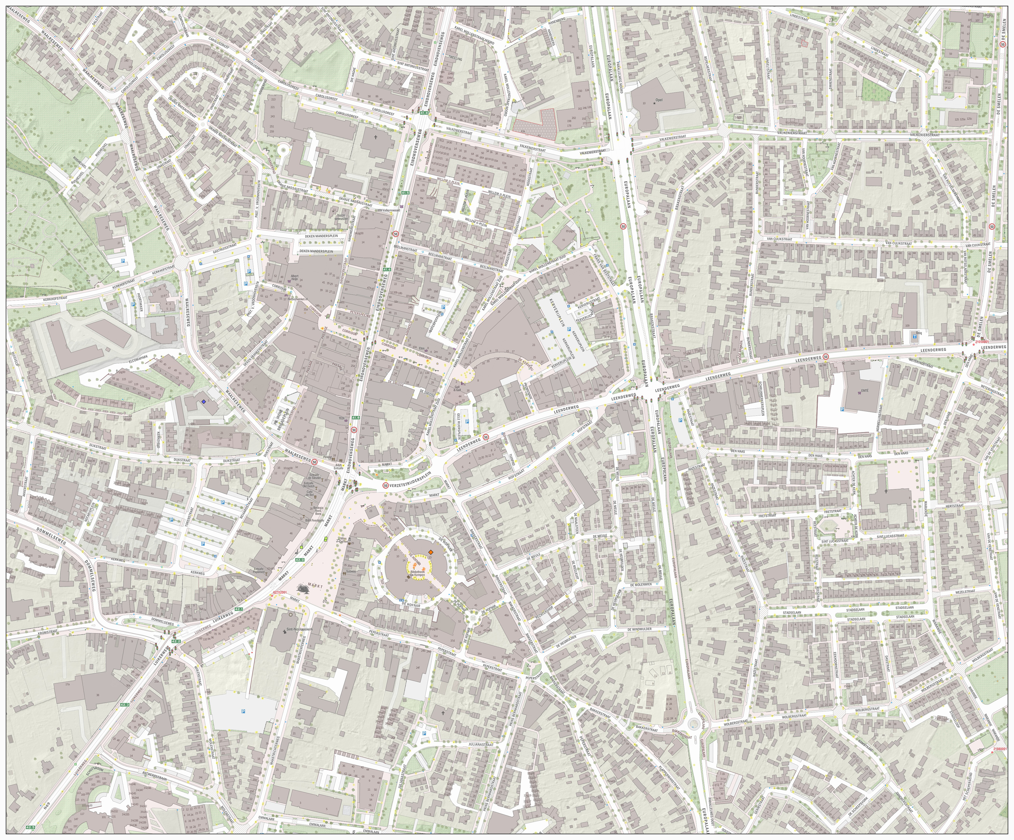 Topografische detailkaart van het centrum van Valkenswaard. Kaartbeeld samengesteld uit de open geodata van de Basisregistratie Grootschalige Topografie (BGT), Creative Commons-BY Kadaster, en Top10NL en Top25namen (Basisregistratie Topografie, Kadaster), Creative Commons-BY Kadaster. Gebouwvlakken uit open geodata BAG extract, Creative Commons-BY Kadaster. Wegen uit de OpenStreetMap, CC-BY OpenStreetMap bijdragers. Reliëfschaduw uit de Actuele Hoogtekaart AHN2/AHN3. Samenstelling en kleurenschema: Jan-Willem van Aalst, met QGIS2. Zie ook de Legenda.